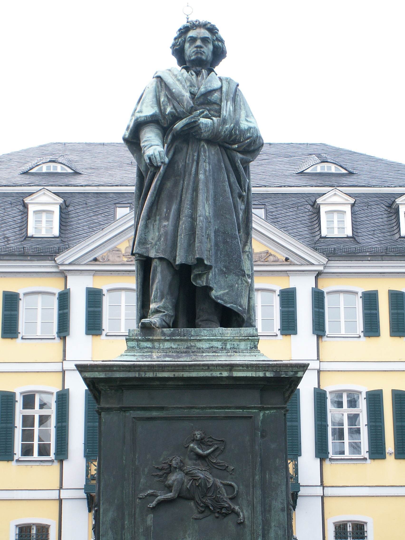 Bonn, Beethovenstatue auf dem Münsterplatz